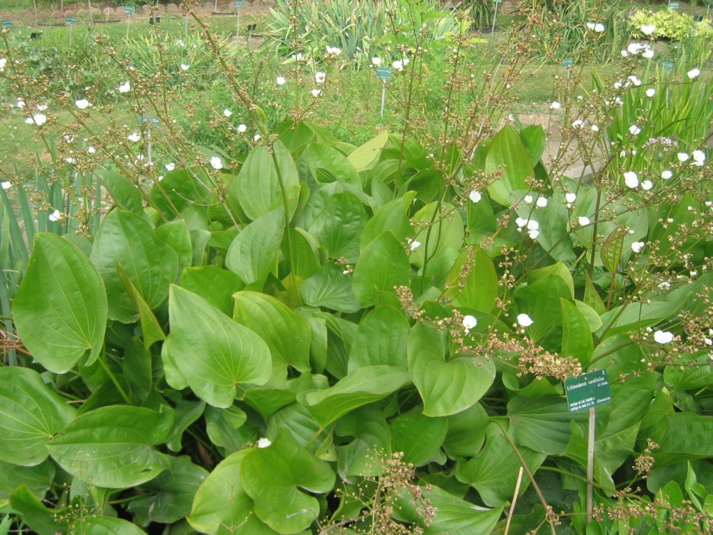 Echinodorus cordifolius. Jardin des Plantes de Paris.